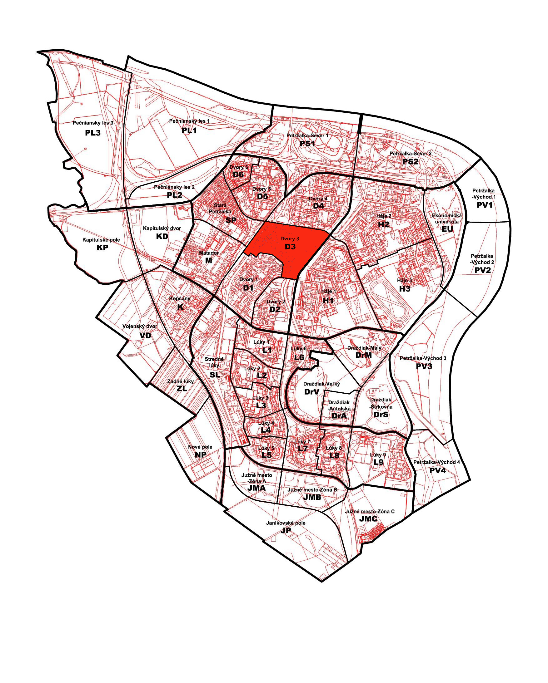 Poloha petržalskej miestnej časti